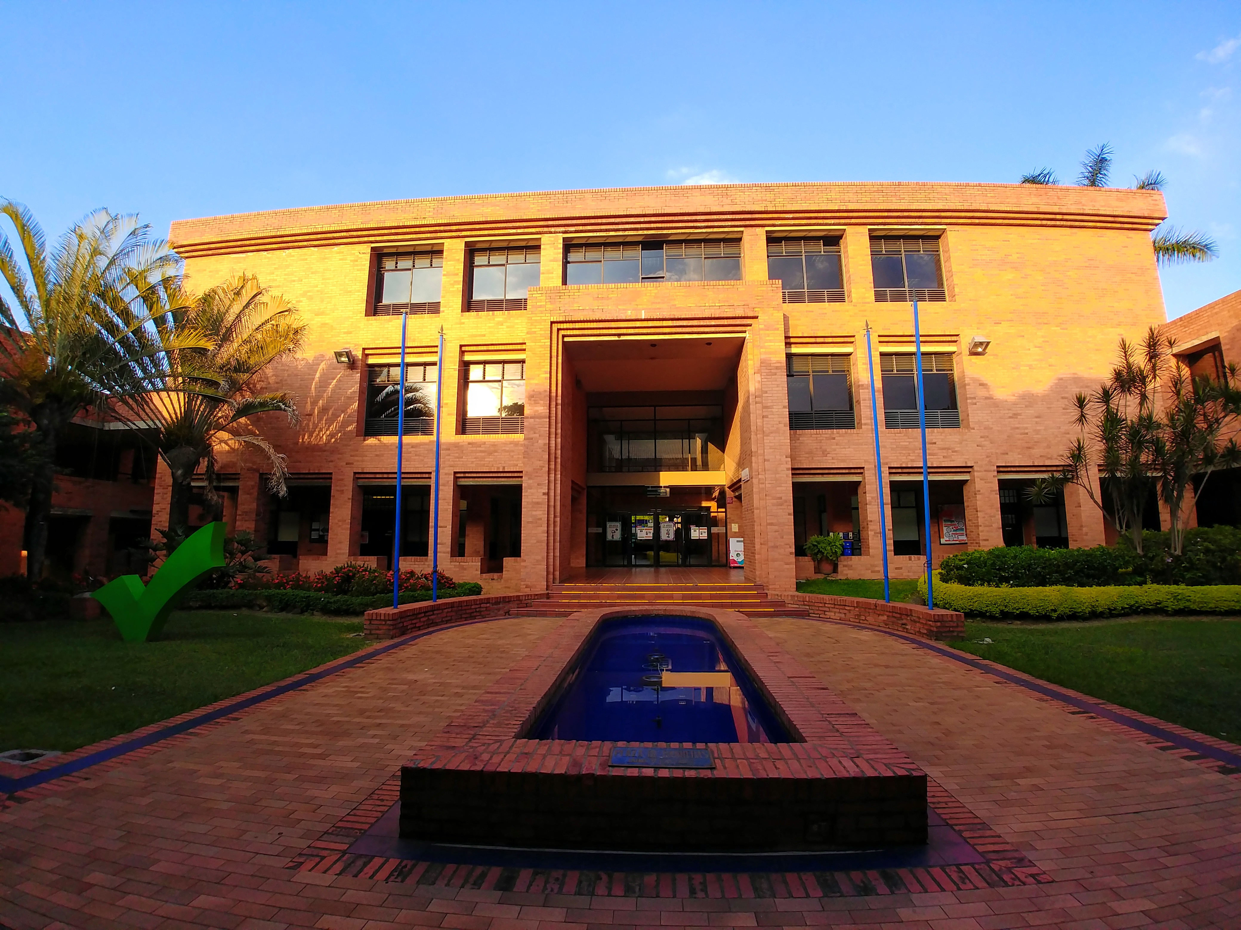 Biblioteca Universidad Icesi